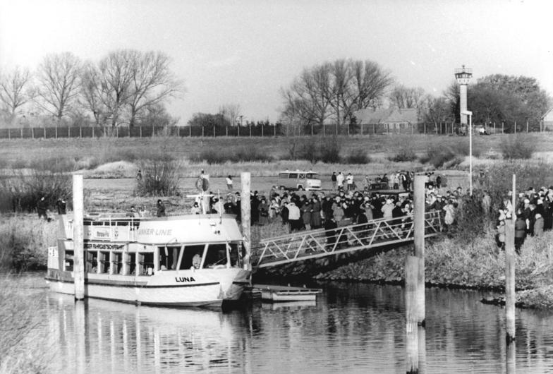 ADN-ZB Pätzold -26.11.89 -BRD: Fährverbindung-Hunderte Einwohner nutzten am Wochenende eine nach über vierzigjähriger Pause aufgenommene Fährverbindung zwischen Darchau im DDR-Kreis Hagenow und dem am anderen Elbufer im BRD-Kreis Lychow-Dannenberg gelegenen Neu Darchau. Die kurzfristig geschaffene Möglichkeit zur Überfahrt nutzen viele für ein Wiedersehen mit Verwandten oder Bekannten. Information added by Wikimedia users.Berichtigung:ADN-ZB Pätzold -26.11.89 -BRD: Fährverbindung-Hunderte Einwohner nutzten am Wochenende eine nach über vierzigjähriger Pause aufgenommene Fährverbindung zwischen Darchau im DDR-Kreis Hagenow und dem am anderen Elbufer im BRD-Kreis Lüchow-Dannenberg gelegenen Neu Darchau. Die kurzfristig geschaffene Möglichkeit zur Überfahrt nutzen viele für ein Wiedersehen mit Verwandten oder Bekannten.